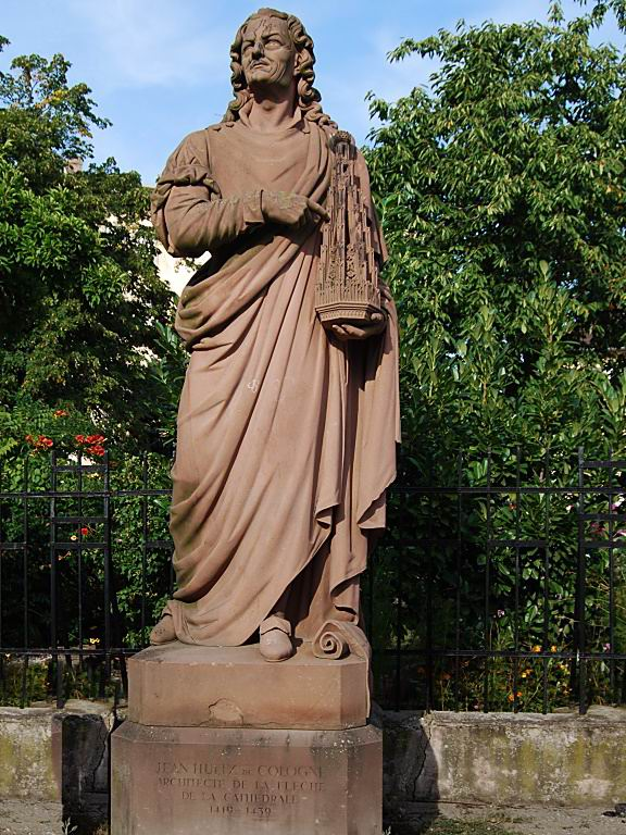 Denkmal für den Erbauer der Turmspitze (Flèche) am Straßburger Münster, Jean Hültz, der auch unter den Namen Johannes Hüls, Jean Hultz bekannt ist. Die Statue ist von André Friedrich (auch Andreas Friederich genannt)